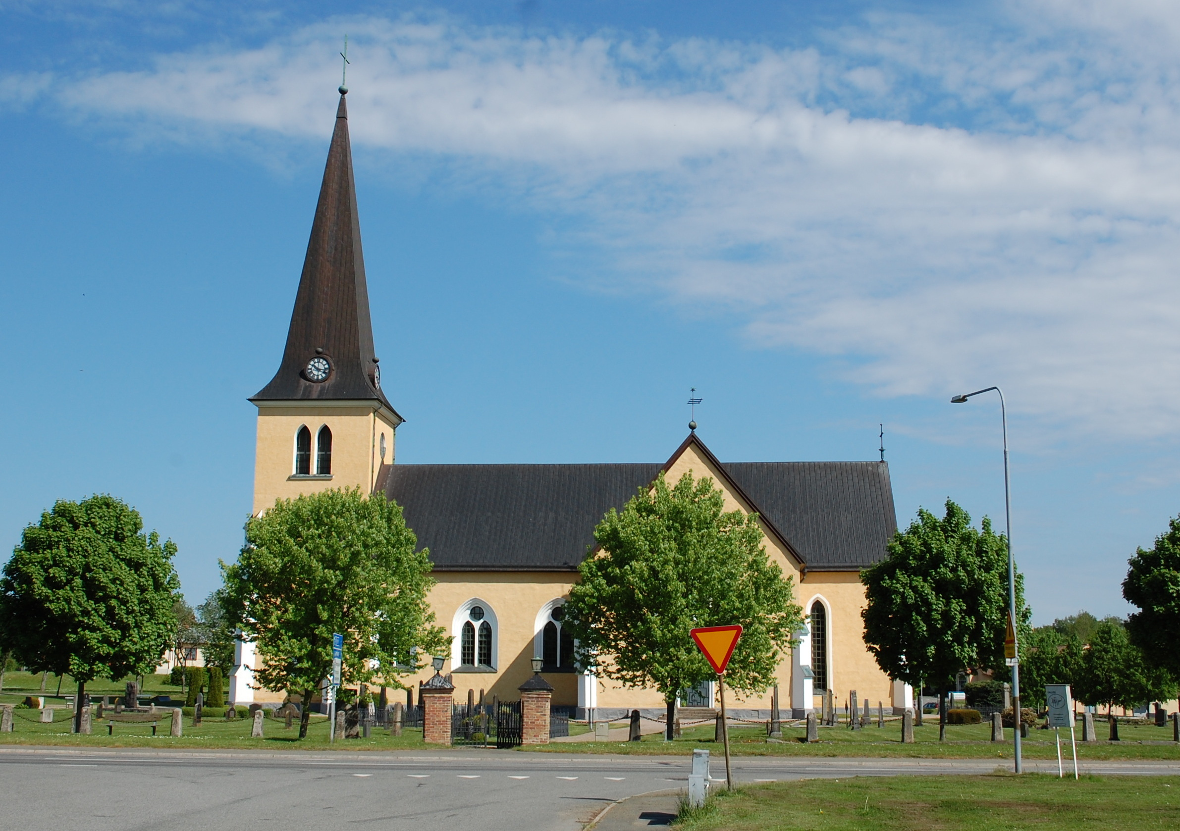 Kirche von Broby, Südseite